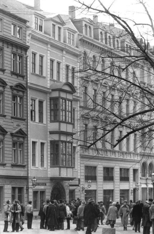 Leipzig, Bosehaus, Bach-Museum Leipzig ist um eine Sehenswürdigkeit reicher: Unmittelbar gegenüber der Thomaskirche , in der Johann Sebastian Bach (1685-1750) 37 Jahre als Thomaskantor wirkte, öffnete am 21. März 1985, anlässlich des 300.Geburtstages des Kaufmanns und Kunstmäzens Georg Friedrich Bose nach umfangreicher Rekonstruktion als Bach-Gedenkstätte seine Pforten. Die Familien Bach und Bose waren eng befreundet, oft musizierten die Bachs bei ihren Gastgebern. Für die Tochter Boses schrieb der Thomaskontor eine Hochzeitskantete, die seinerzeit im Sommersaal des Bosehauses (siehe 313N) uraufgeführt wurde. In dem Haus, das Zentrum der Bachpflege in der DDR ist, sind auf 170 Quadratmeter Ausstellungsfläche, Dokumente, Handschriften, Musikinstrumente und andere Axponate zu sehen. Sie geben Einblick in das Leben und Wirken Bachs und über seine Zeit. Reporter: Gahlbeck .1985-0325-309N-copyright: ADN-Zentralbild DDR-siehe auch 310-313N